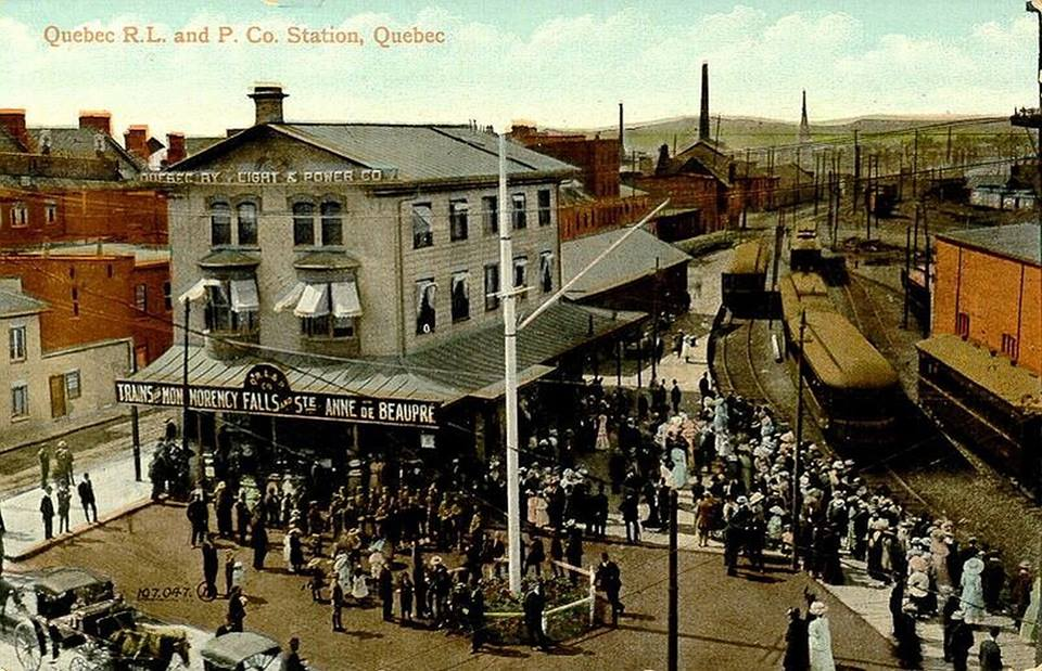 Vers 1905, la station de la compagnie qui exploitait le tramway, la Quebec Railway Light & Power Co., à l’angle des rues Saint-Paul et Ramsay. « 14 août 1889 : Le cardinal Elzéar-Alexandre Taschereau monte à bord du wagon privé de l’entrepreneur Horace Jansen Beemer pour bénir le parcours ferroviaire entre le village de Hedleyville (Limoilou) et Sainte-Anne-de-Beaupré. Le chemin de fer «Quebec, Montmorency & Charlevoix» avait été inauguré le 10 août précédent. » – Société historique de Québec